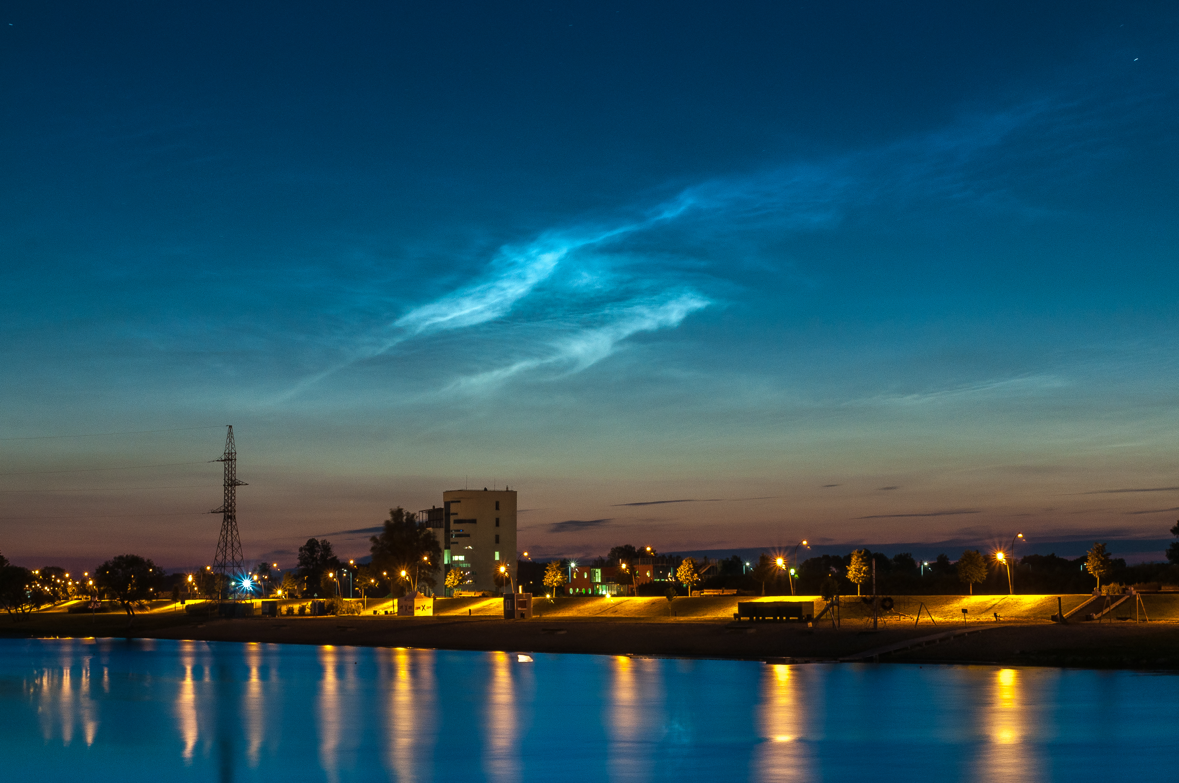 Sudrabainie mākoņi. Pasta sala, Jelgava, 10.07.2016.